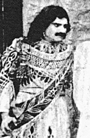 Homi Master dans Bhakta Vidur (1921)